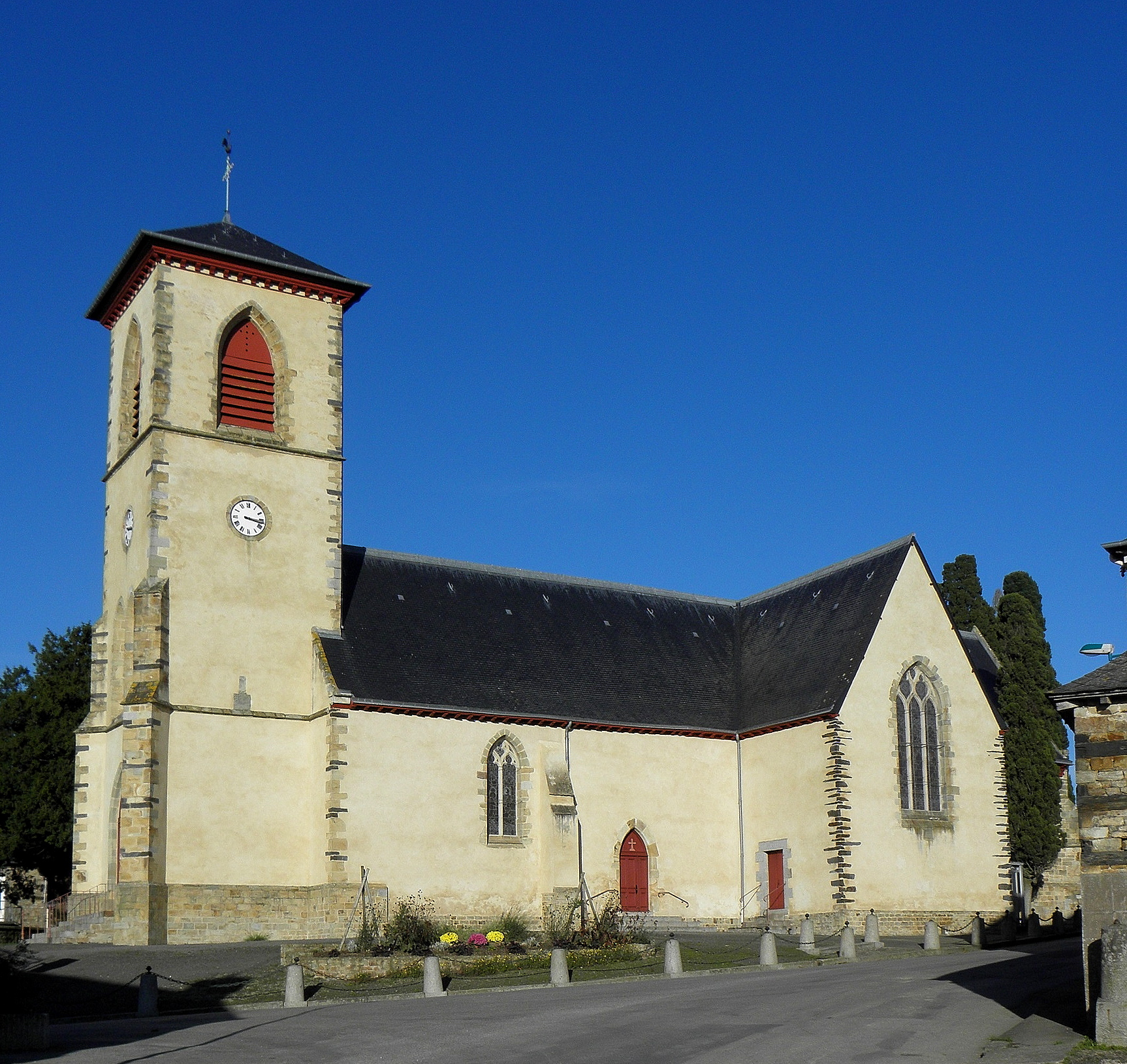 Église Notre-Dame-de-la-Visitation, commune de Vergéal (35). Vue méridionale.